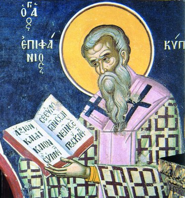 Св. Епіфаній Кіпрський. Роспис кафолікону монастиря прп. Діонісія на Афоні. 1547 р.